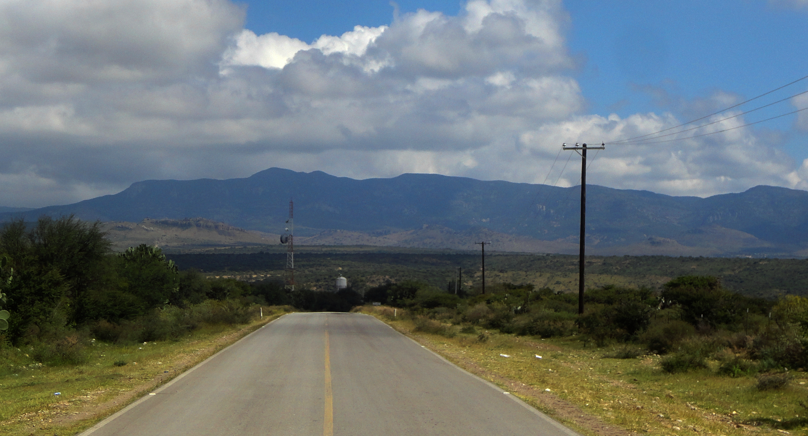 Sierra del Cubo, San Felipe, Guanajuato, México - Vista desde La Quemada